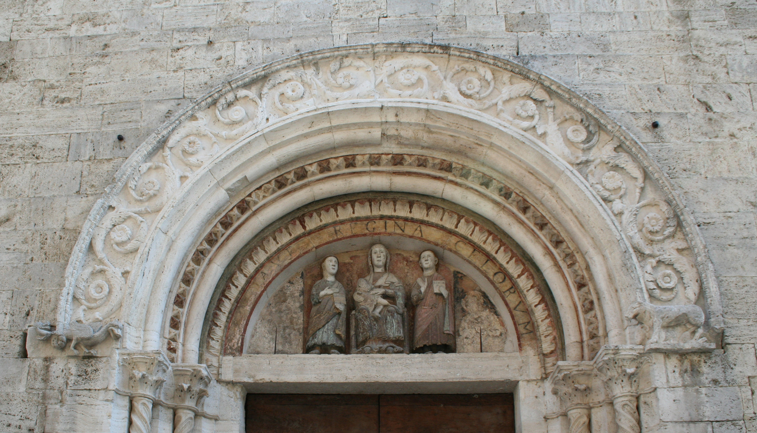 Particolare delle statue dell'XI secolo, collocate nello spazio della lunetta, del portale laterale della chiesa di San Giacomo Apostolo di Ascoli Piceno.